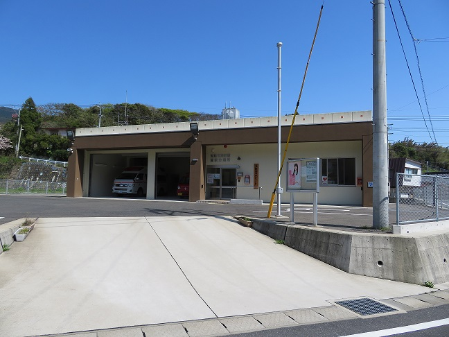 対馬市消防本部 豆酘分遣所